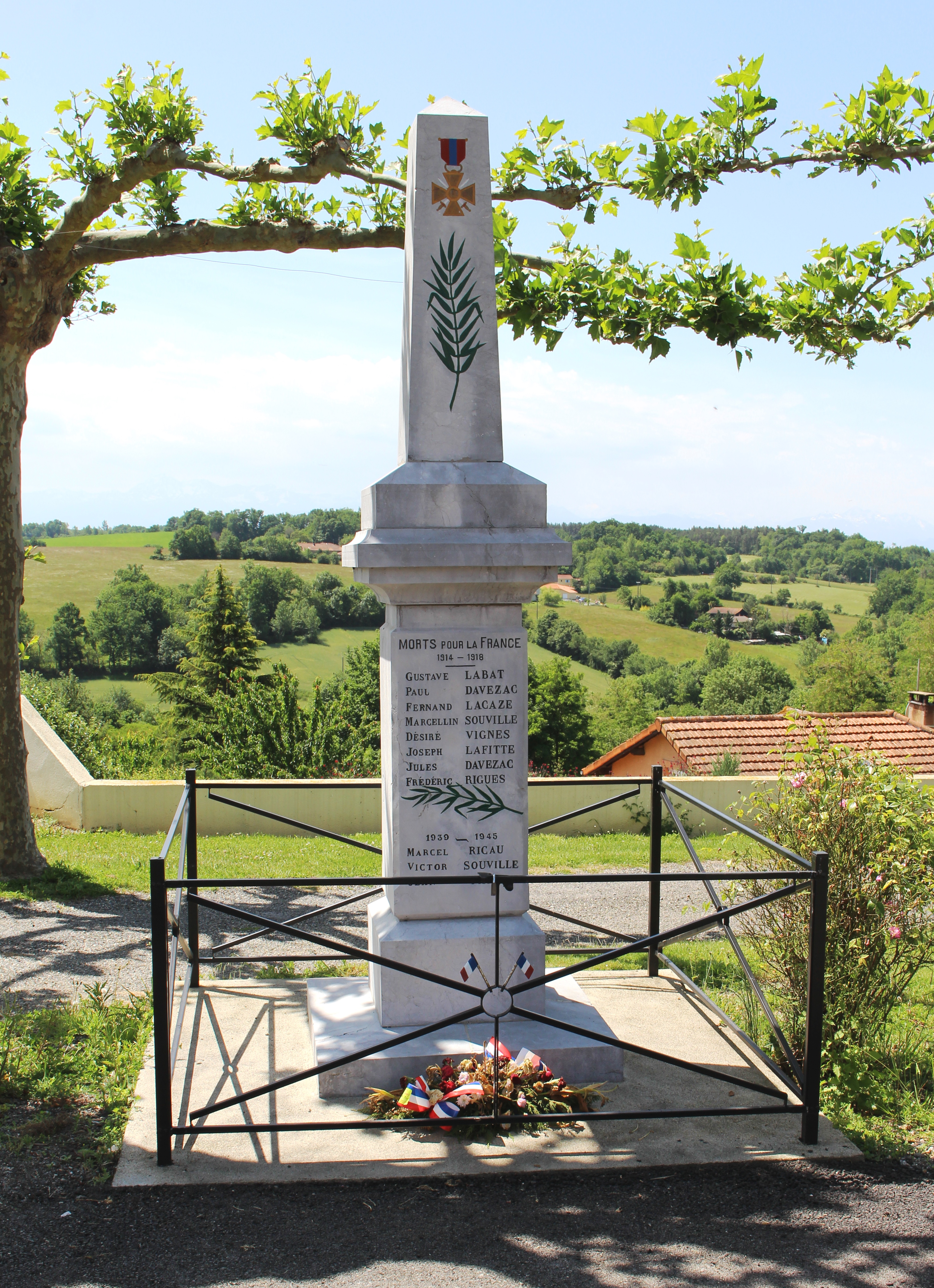 Monument aux morts de Sénac (Hautes-Pyrénées)